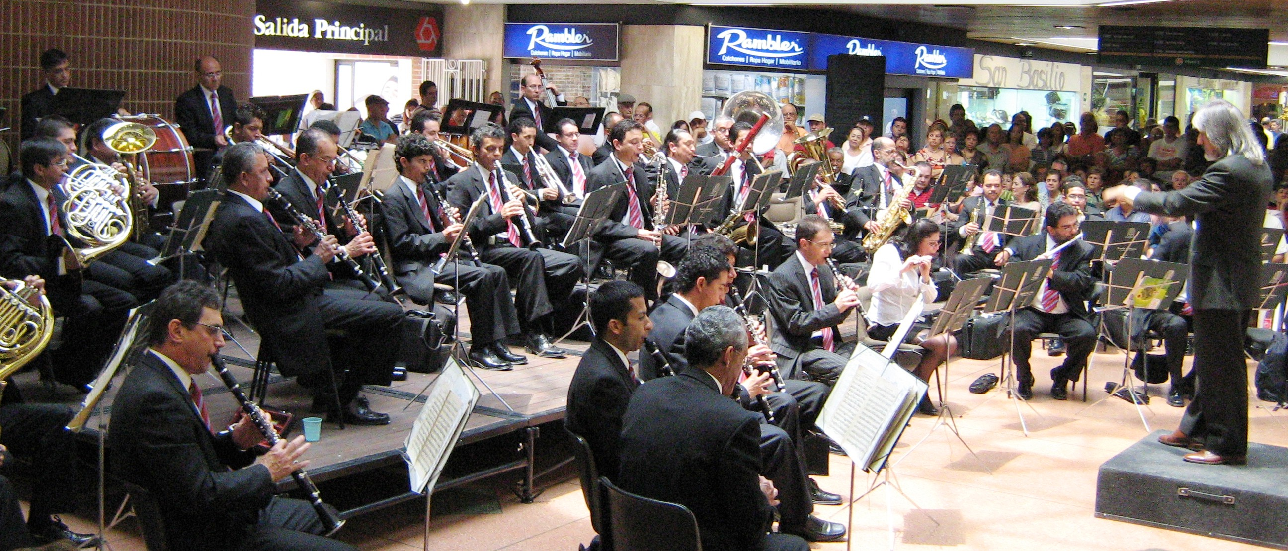 Banda Sinfónica Universidad de Antioquia, concierto en el centro comercial Unicentro, Medellín, Colombia.